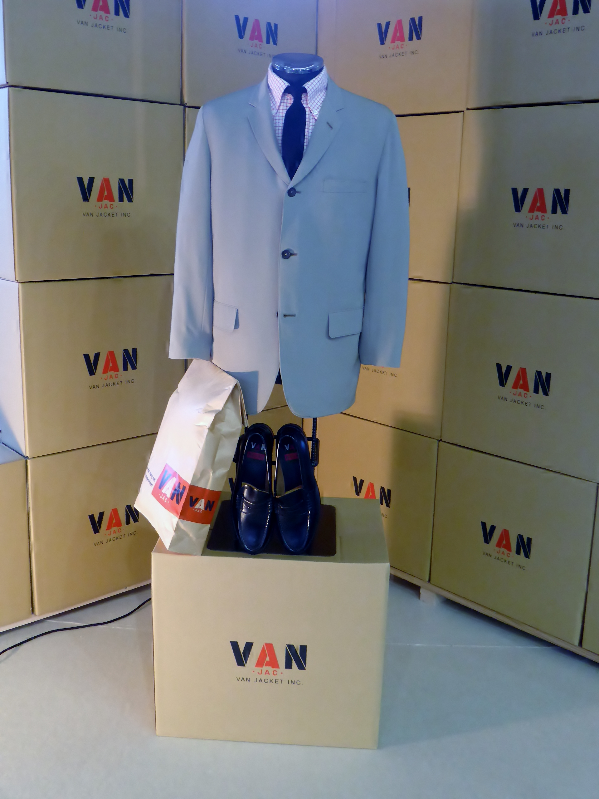 ヴァンヂャケットI.V.Y.モデルジャケットを撮影。